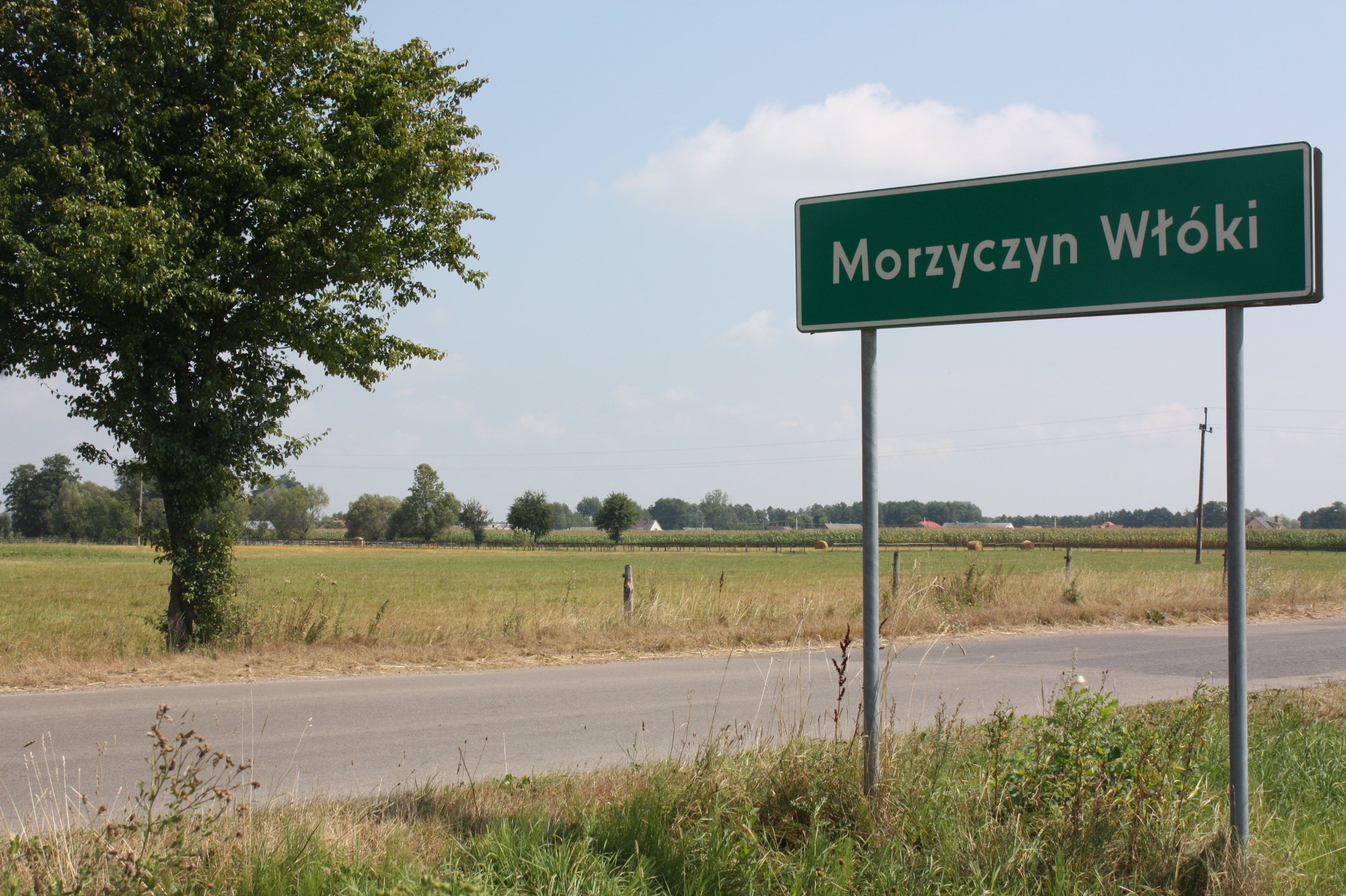 Morzyczyn Włóki wjazd do wsi od strony Morzyczyna Włościańskiego